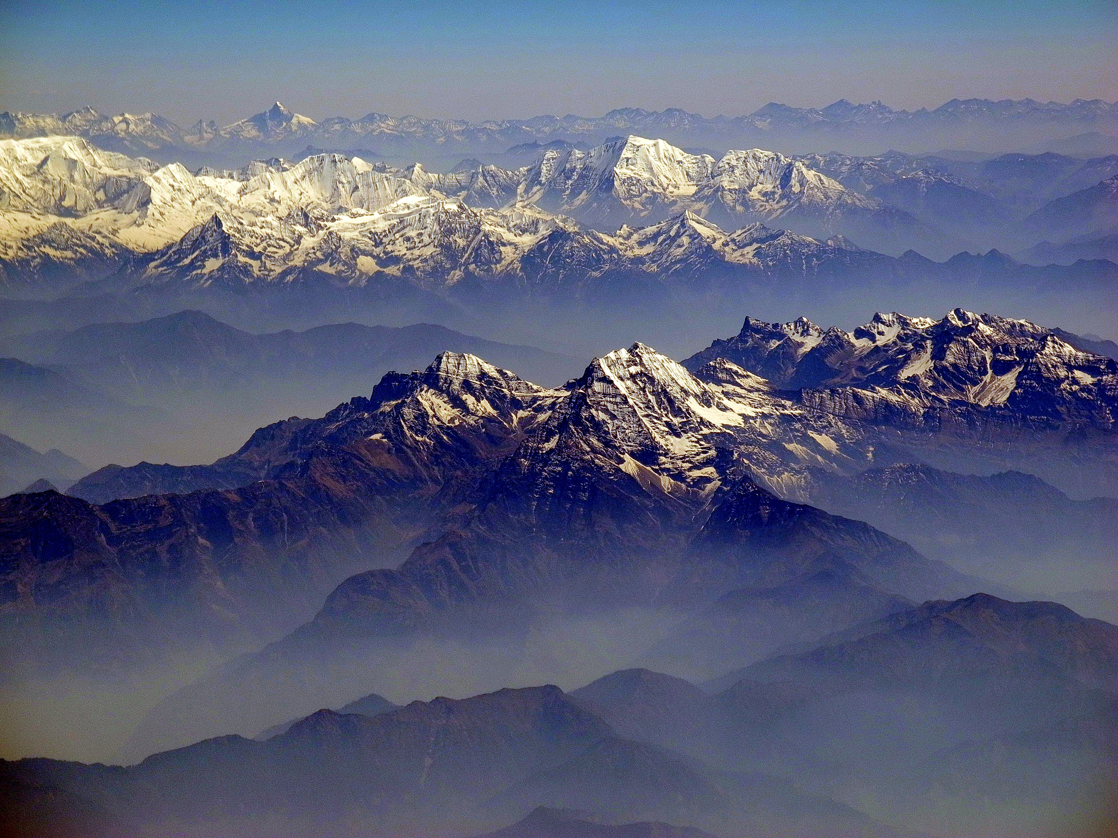 chaine Himalayenne (Anapurna) après le décollage de Kathmandu